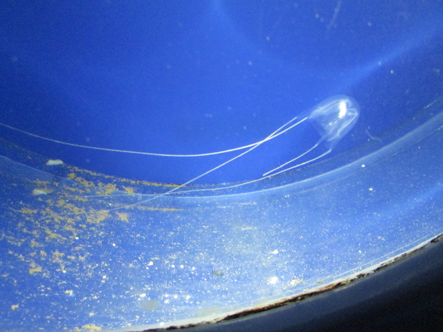 新江ノ島水族館で展示されていた個体です。